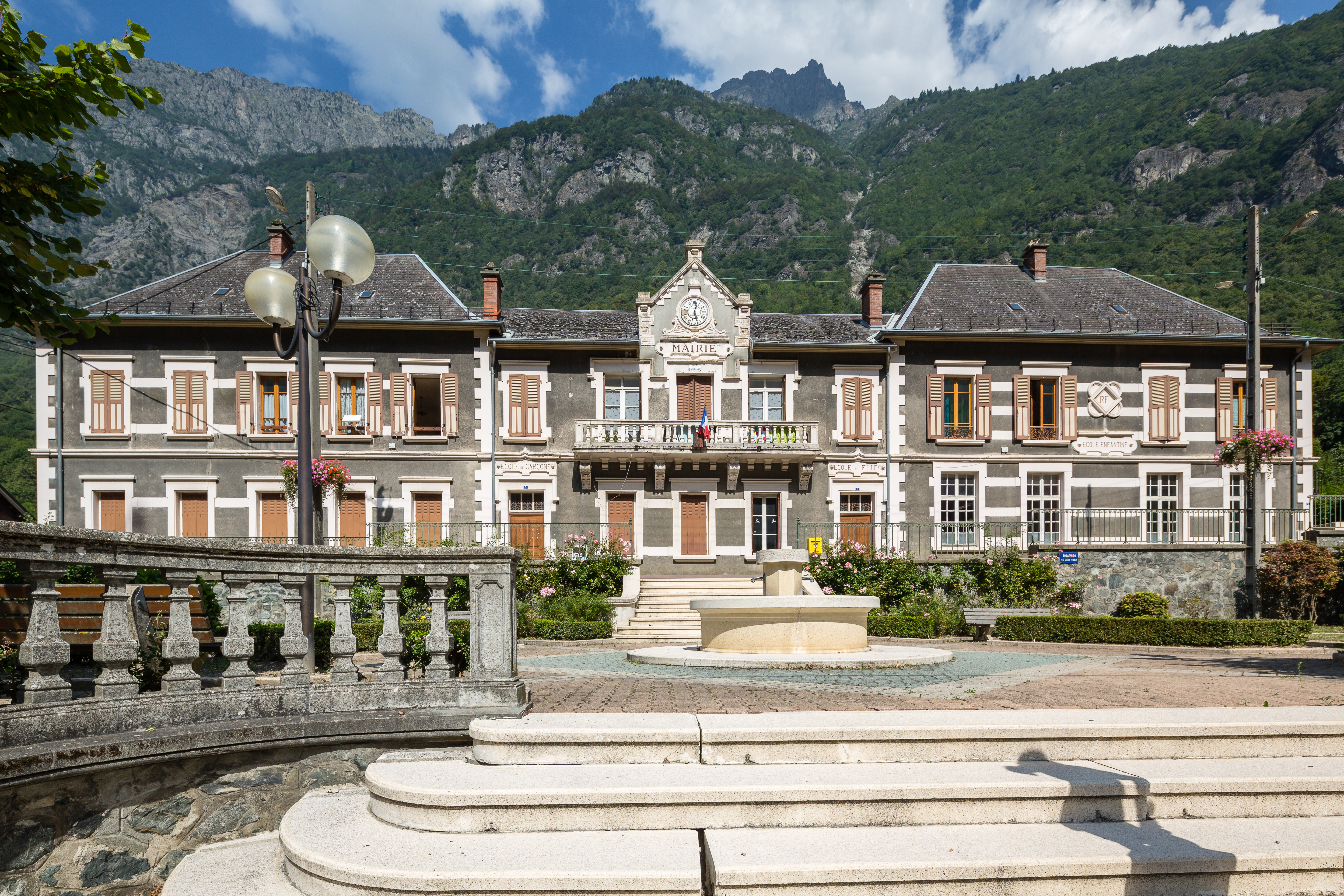 Ancienne mairie et école (garçons et filles) de Livet-et-Gavet (France).